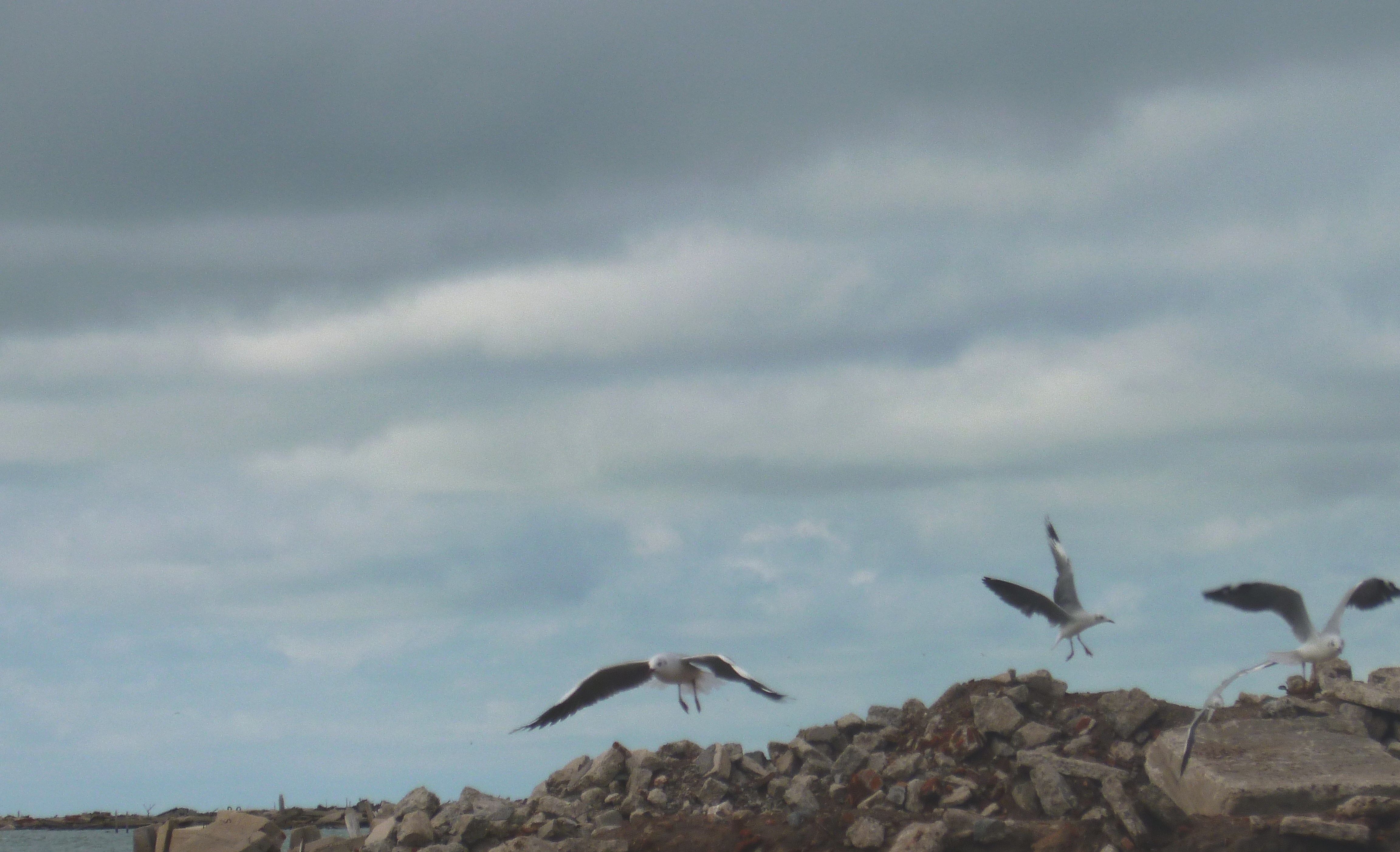 Gaviotas volando en los Bañados del Rio Dulce y Laguna Mar Chiquita(Reserva Provincial de Cordoba-Argentina_Declarada sitio Ramsar